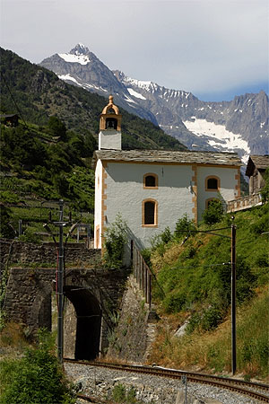 Kapelle in Neubrück (Stalden)